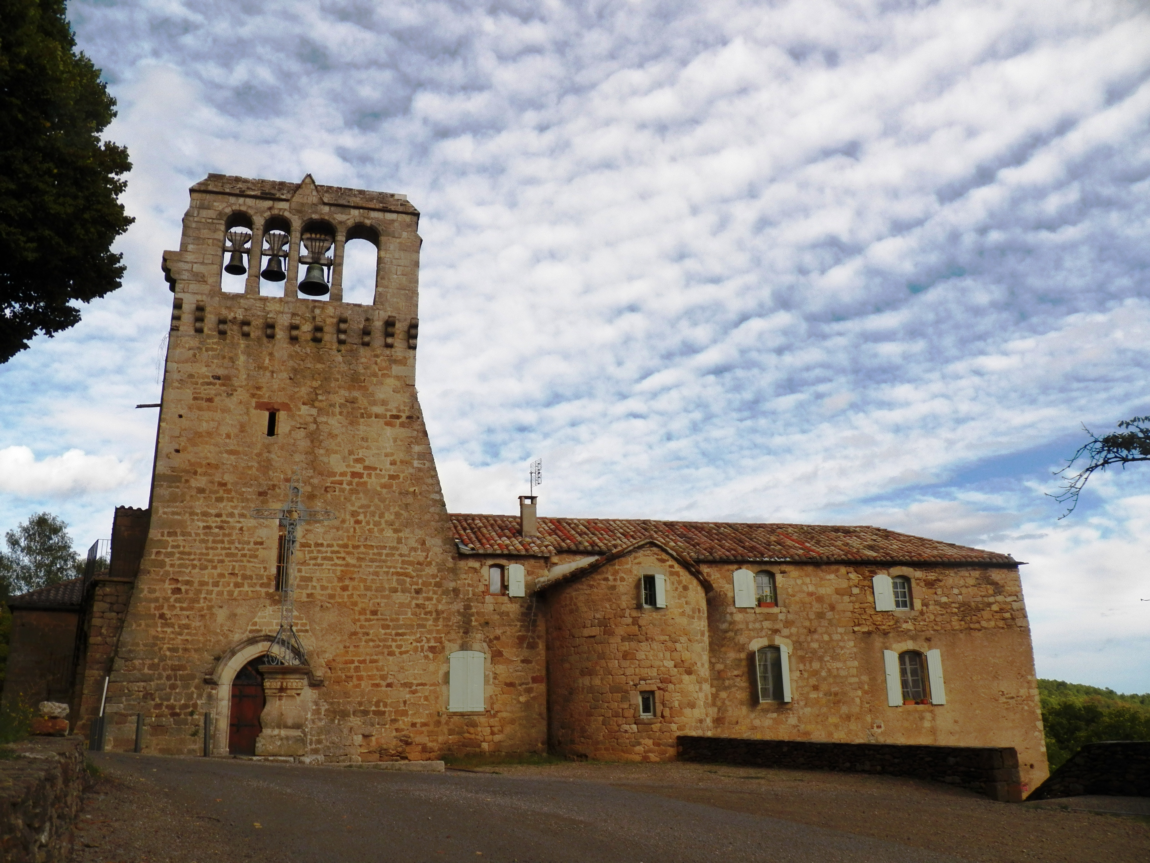 Eglise Romane de Saint Theofrede a Faugeres (Ardeche)